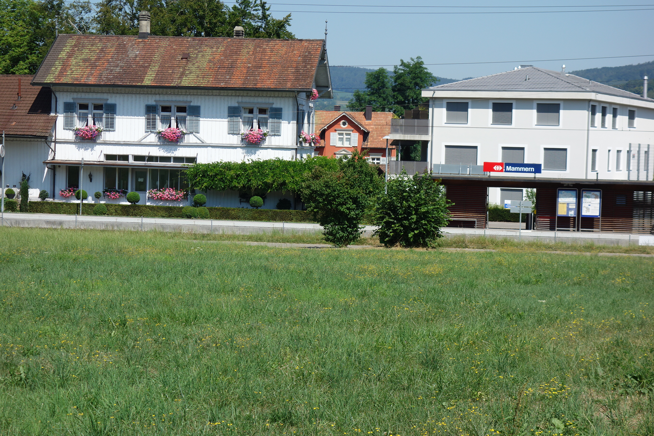 Bahnhof Mammern TG, Schweiz